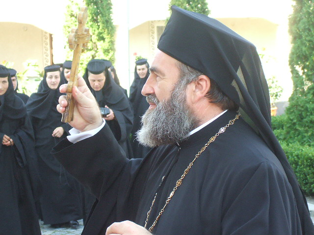 Acasta imagine il reprezinta pe PS Ioachim Bacauanul, la M-rea Ciolpani. FinePixA700.